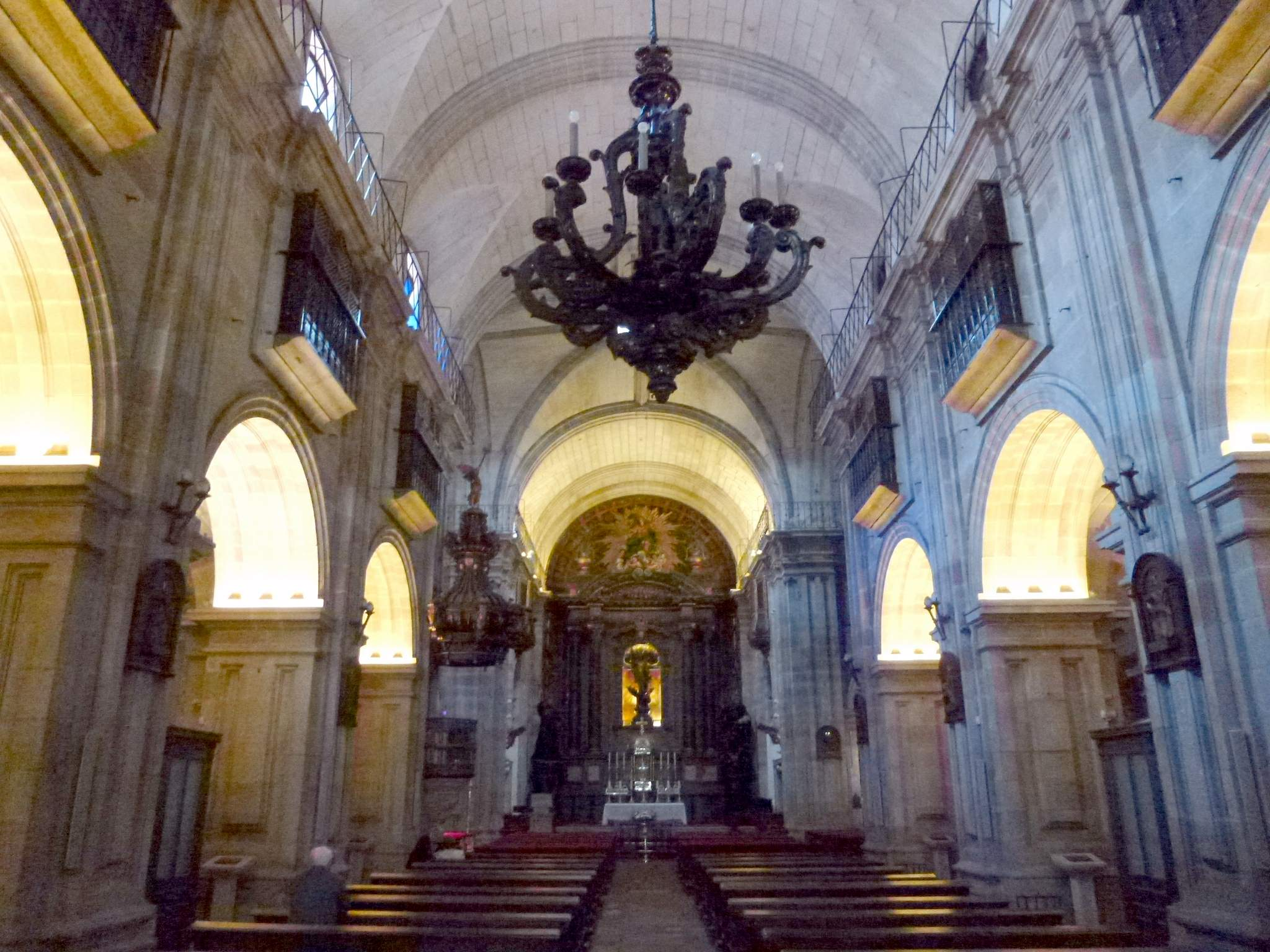 A Coruña - Iglesia de San Jorge